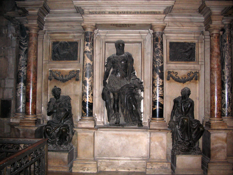 Monumento funebre di Gian Giacomo Medici